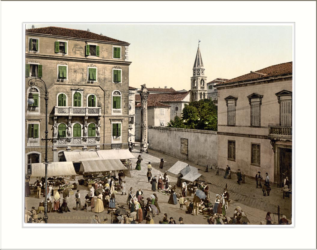 Zara Erbe Square Dalmatia Austro-Hungary